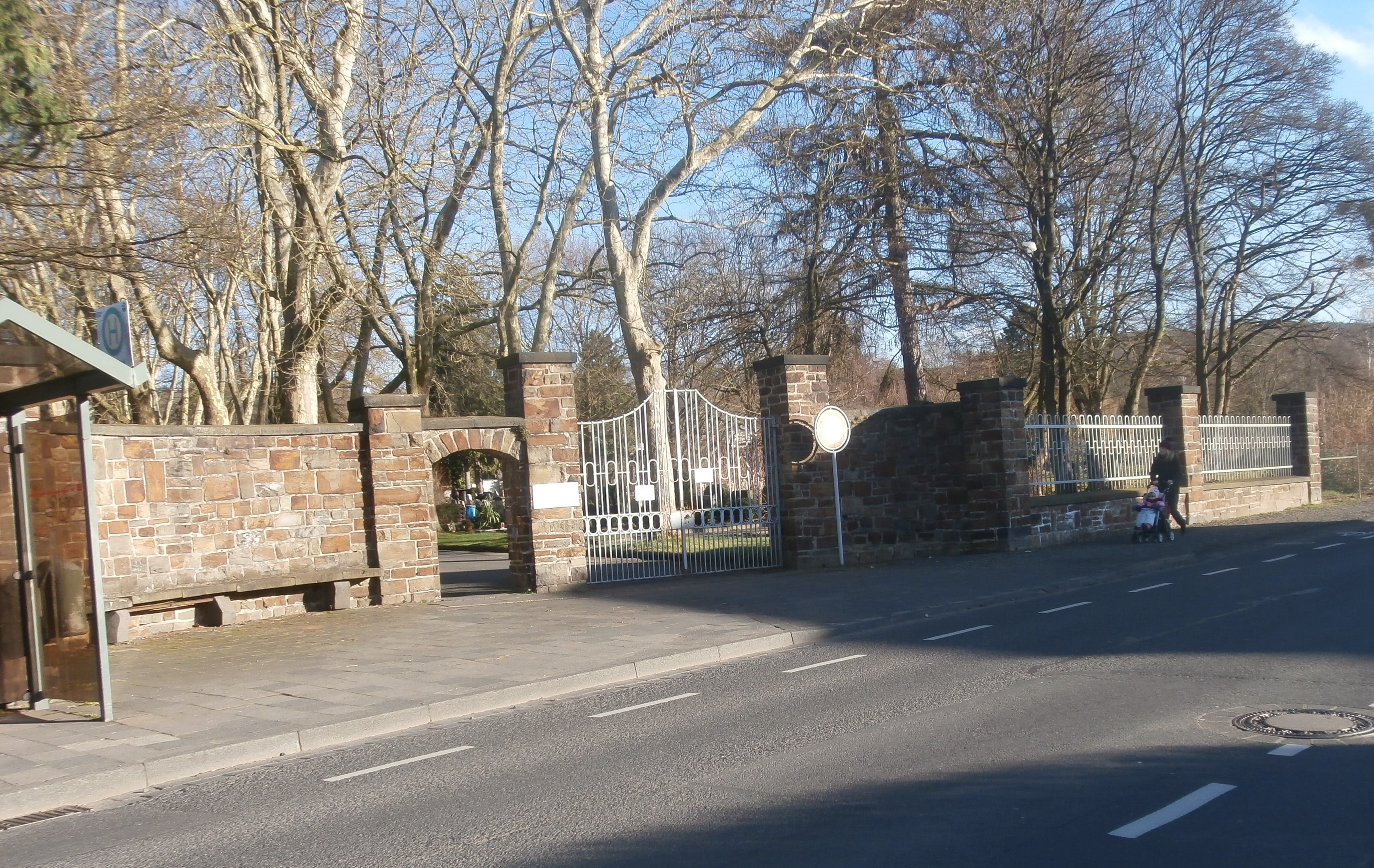 Neuer Friedhof, Linzer Straße, Bad Honnef: Eingang